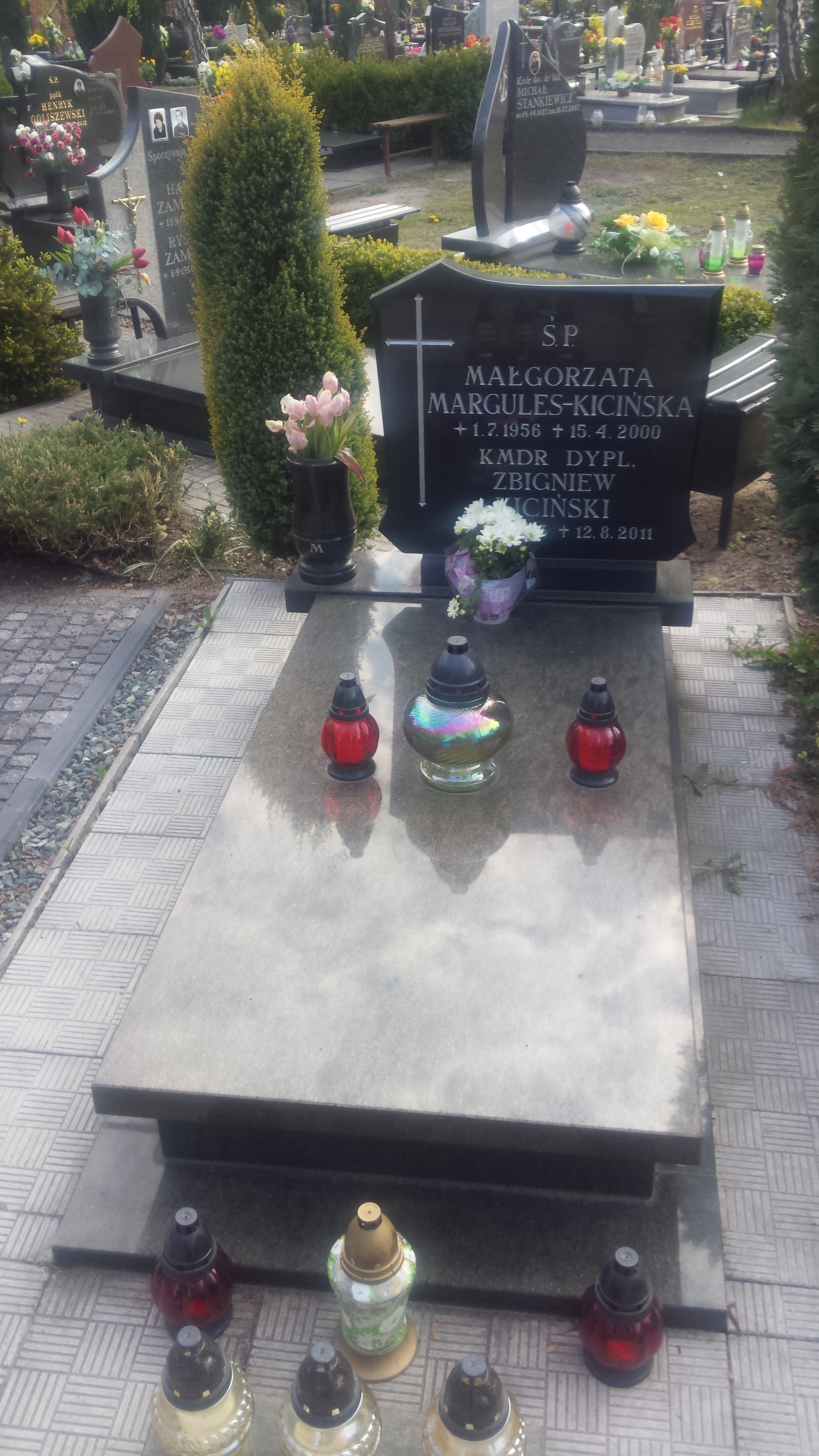 grób kmdra Zbigniewa Kicińskiego na Cmentarzu Marynarki Wojennej w Gdyni